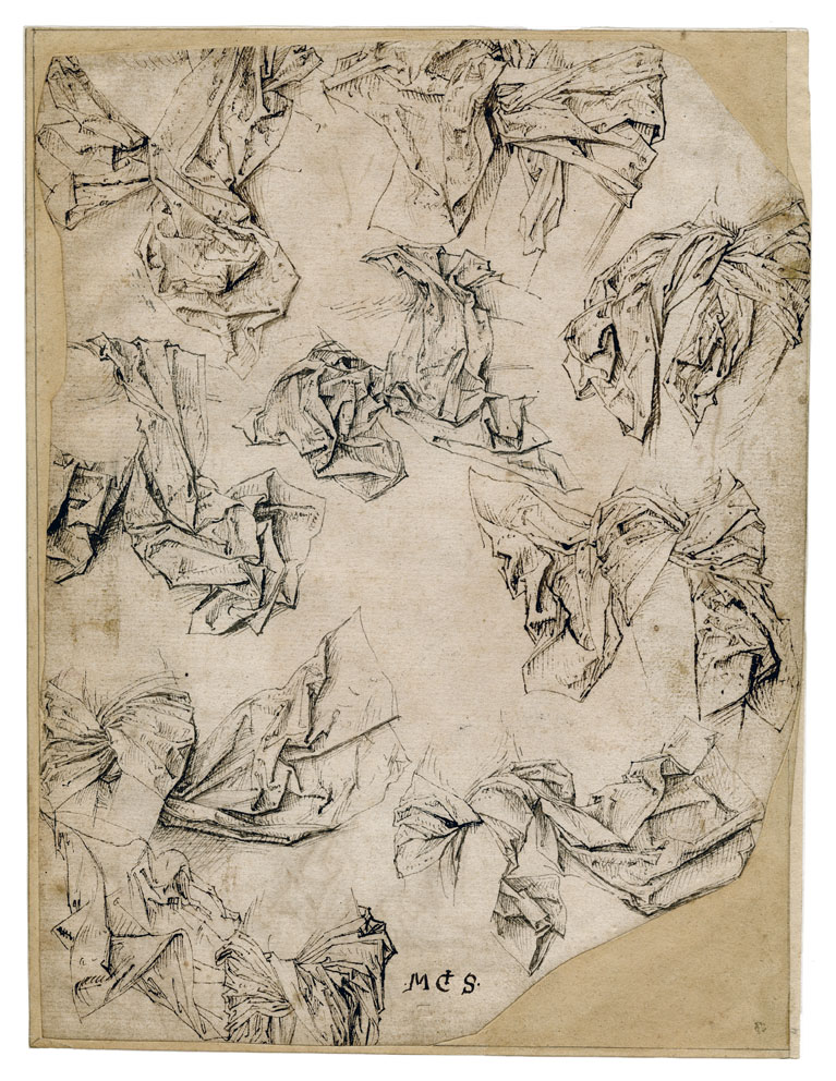 Maitre des études des draperies, Drapés, plume et encre sur papier